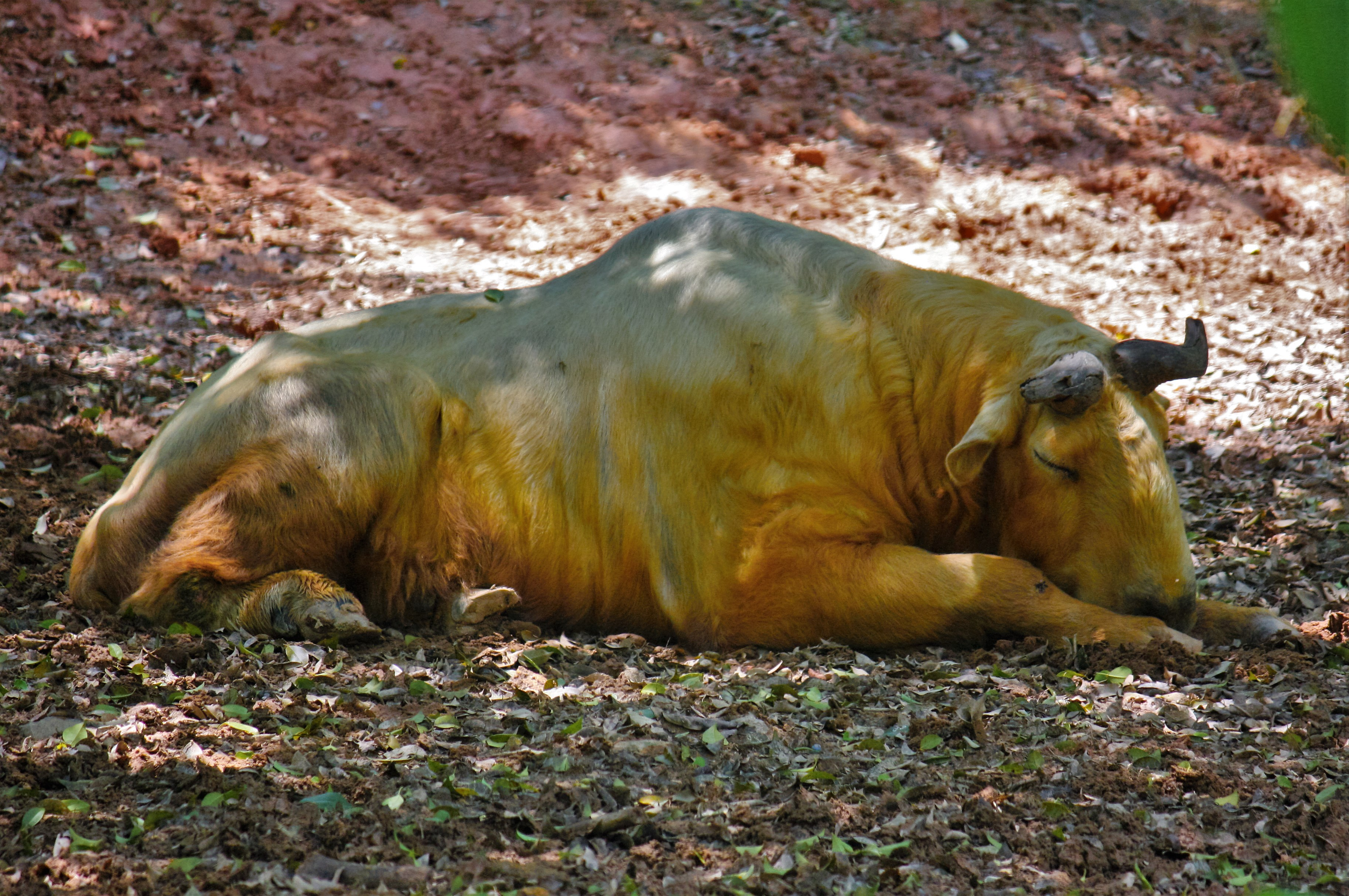 Zoo Guangzhou